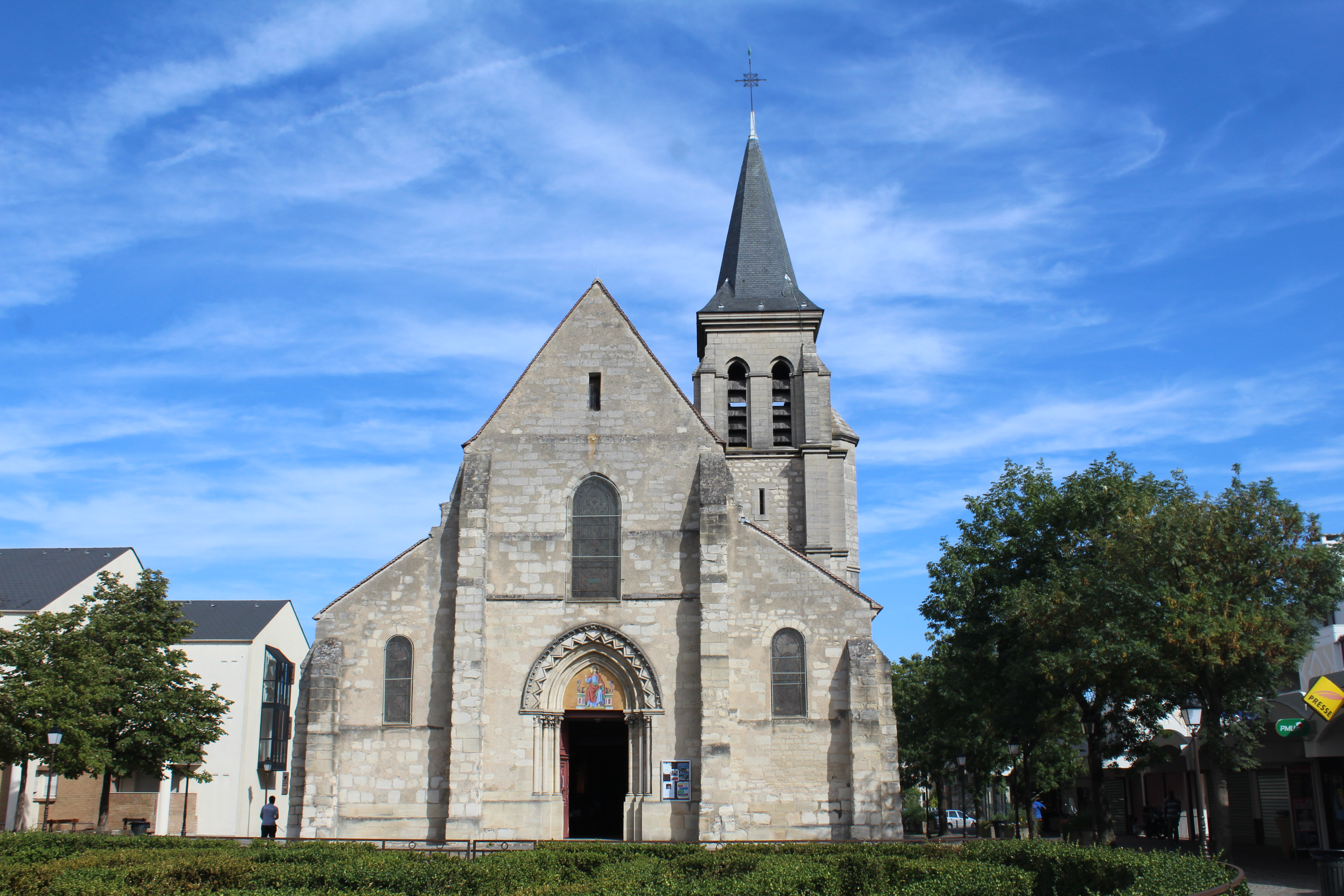 Église Sainte-Baudile à Neuilly-sur-Marne.